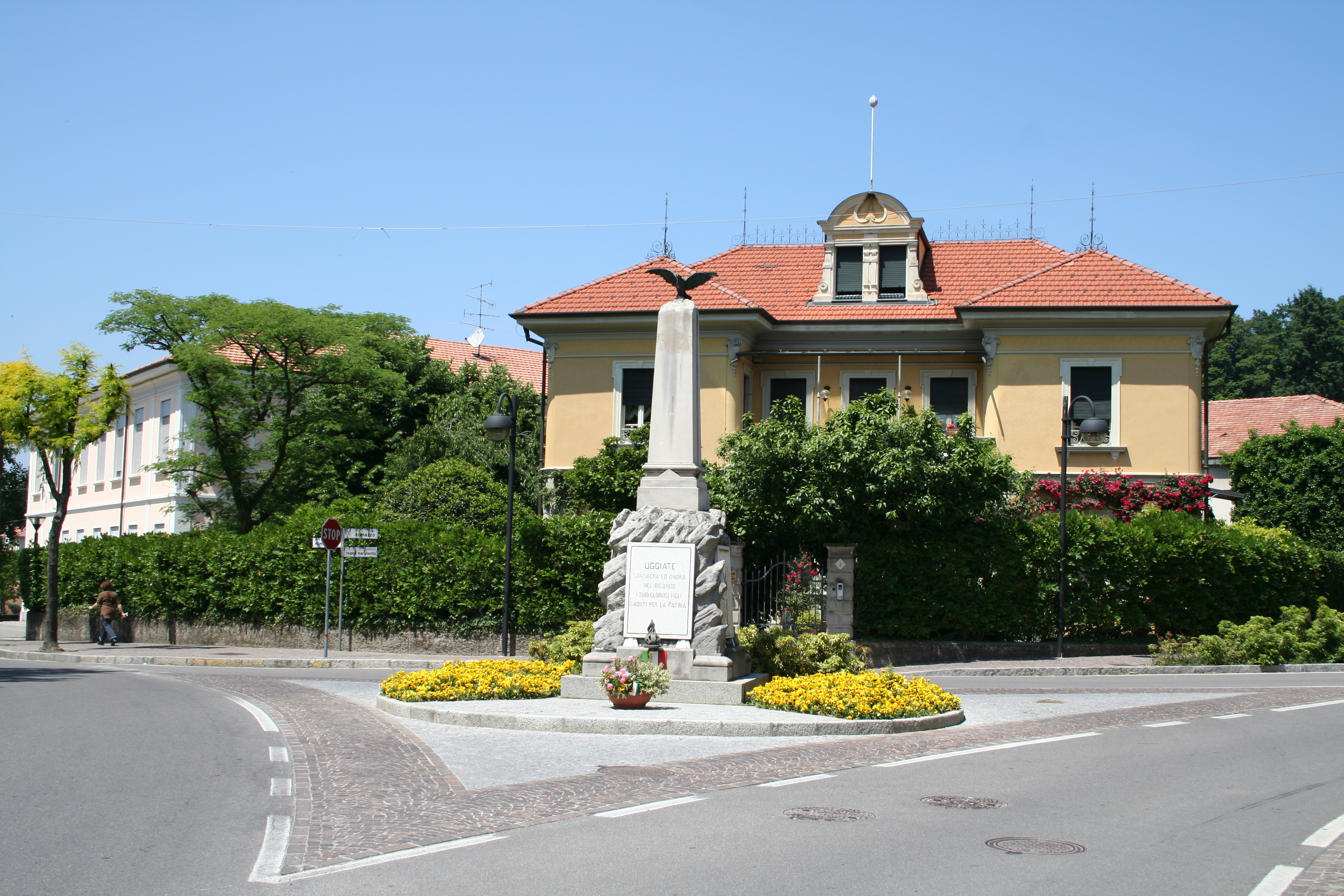 Il Monumento ai caduti di Uggiate. Sullo sfondo Villa Lavizzari.